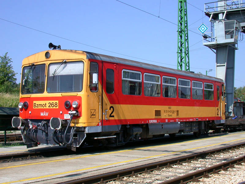 Remotorizált Bzmot 268 (ex Bzmot 096) 2002.07.10-én Sopronban.